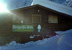 Hütte von der Frontansicht im Winter